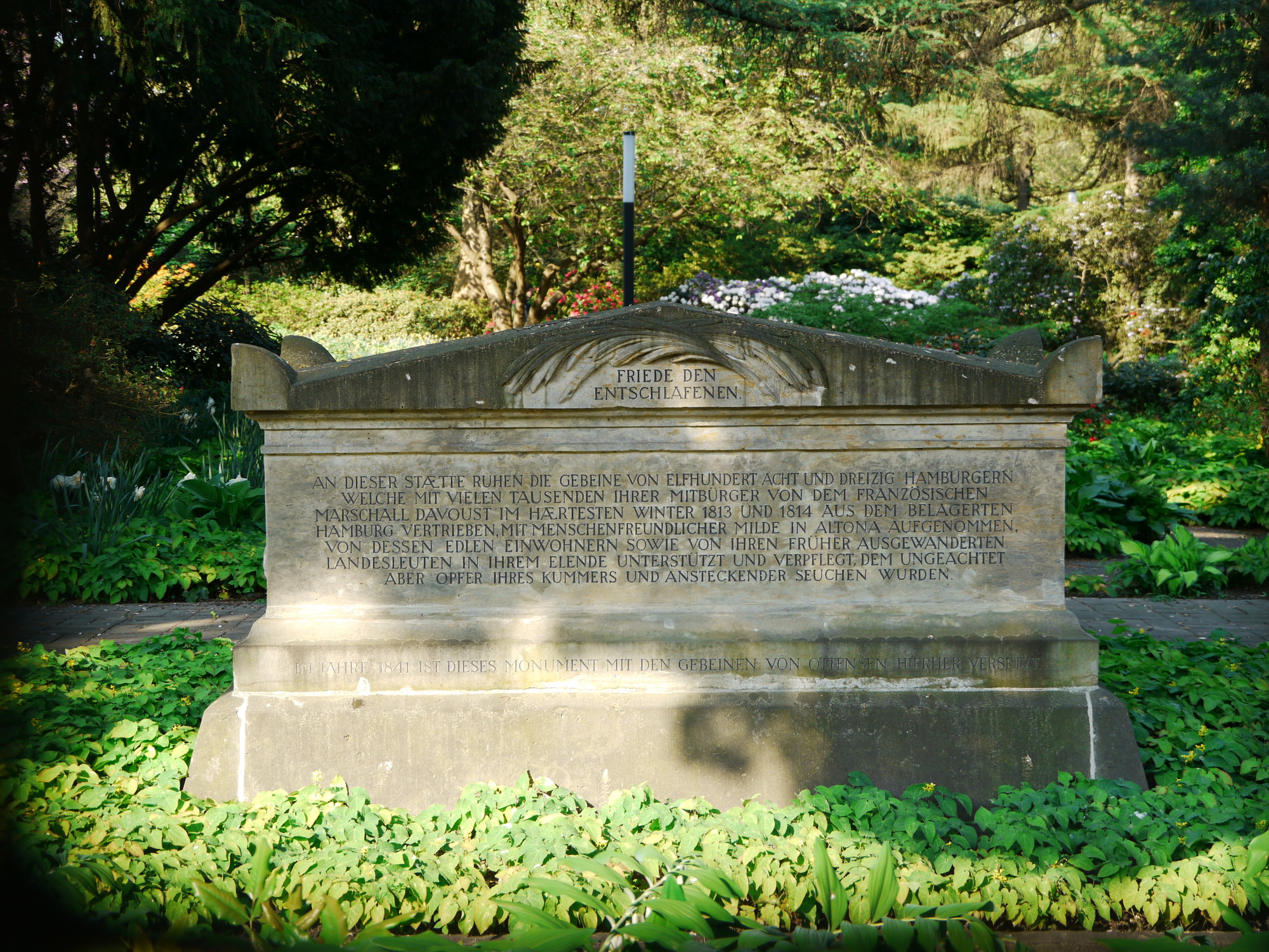 Gedenkstein für die im Winter 1813/14 gestorbenen 1138 Hamburger, die von den Franzosen nach Altona vertrieben wurden. Der Gedenkstein wurde auf Initiative der Patriotischen Gesellschaft von Carl Ludwig Wimmel geschaffen und stand zunächst auf dem Begräbnisplatz in Ottensen, einer Weide des Ottenser Vogts Prahl an der heutigen Einmündung der Erdmannstraße in die Große Brunnenstraße. Nach der Umbettung der Gebeine wurde 1841 auch das Denkmal auf die Friedhöfe an der heutigen Petersburger Straße in St. Pauli versetzt. Es befindet sich innerhalb des Parks Planten un Blomen wenige Schritte westlich des Eingangs St. Petersburger Str. 22 und ist auch von der St. Petersburger Straße aus zu sehen (gegenüber Messehalle B4 Tor 7). Inschrift Friede den Entschlafenen An dieser Stätte ruhen die Gebeine von elfhundert acht und dreizig Hamburgern, welche mit vielen tausenden ihrer Mitbürger von dem französischen Marschall Davoust im härtesten Winter 1813 und 1814 aus dem belagerten Hamburg vertrieben, mit menschenfreundlicher Milde in Altona aufgenommenn, von dessen edlen Einwohnern sowie von ihren früher ausgewanderten Landesleuten in ihrem Elende unterstützt und verpflegt, dem ungeachtet aber Opfer ihres Kummers und ansteckender Seuchen wurden. Im Jahre 1841 ist dieses Monument mit den Gebeinen von Ottensen hierher versetzt. ID 29202 in Denkmalliste nach § 6 Absatz 1 Hamburgisches Denkmalschutzgesetz vom 05. April 2013, (HmbGVBl S. 142): Auszug für den Bezirk Hamburg-Mitte (pdf) Stand: 29. Oktober 2013 This is a photograph of an architectural monument.